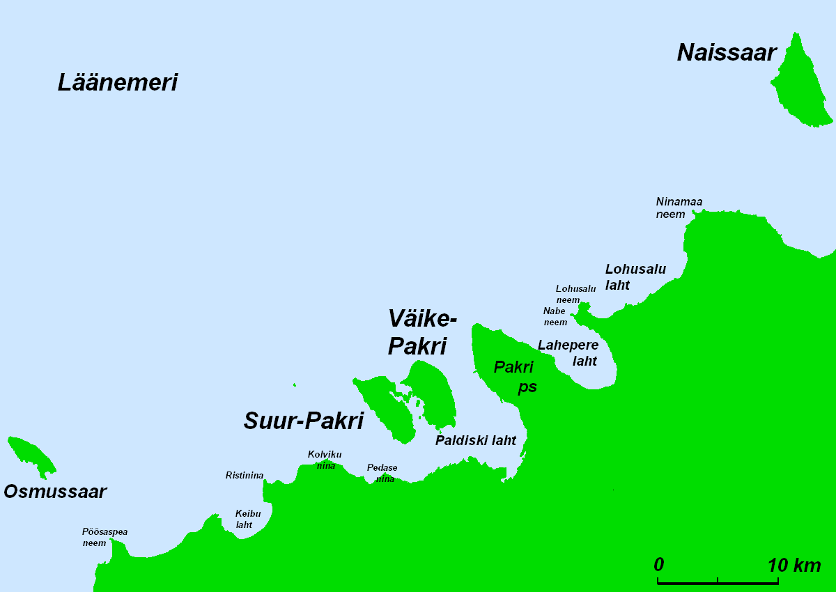 Suur- ja Väike-Pakri lähiümbrus